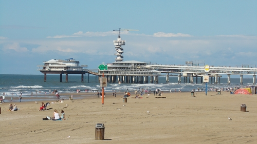 Nedersaksies: Scheveningen_pier.jpg